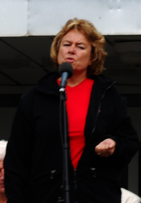 Tidligere statsråd Anne-Lise Bakken under valgkamp i Hamar for Arbeiderpartiet.